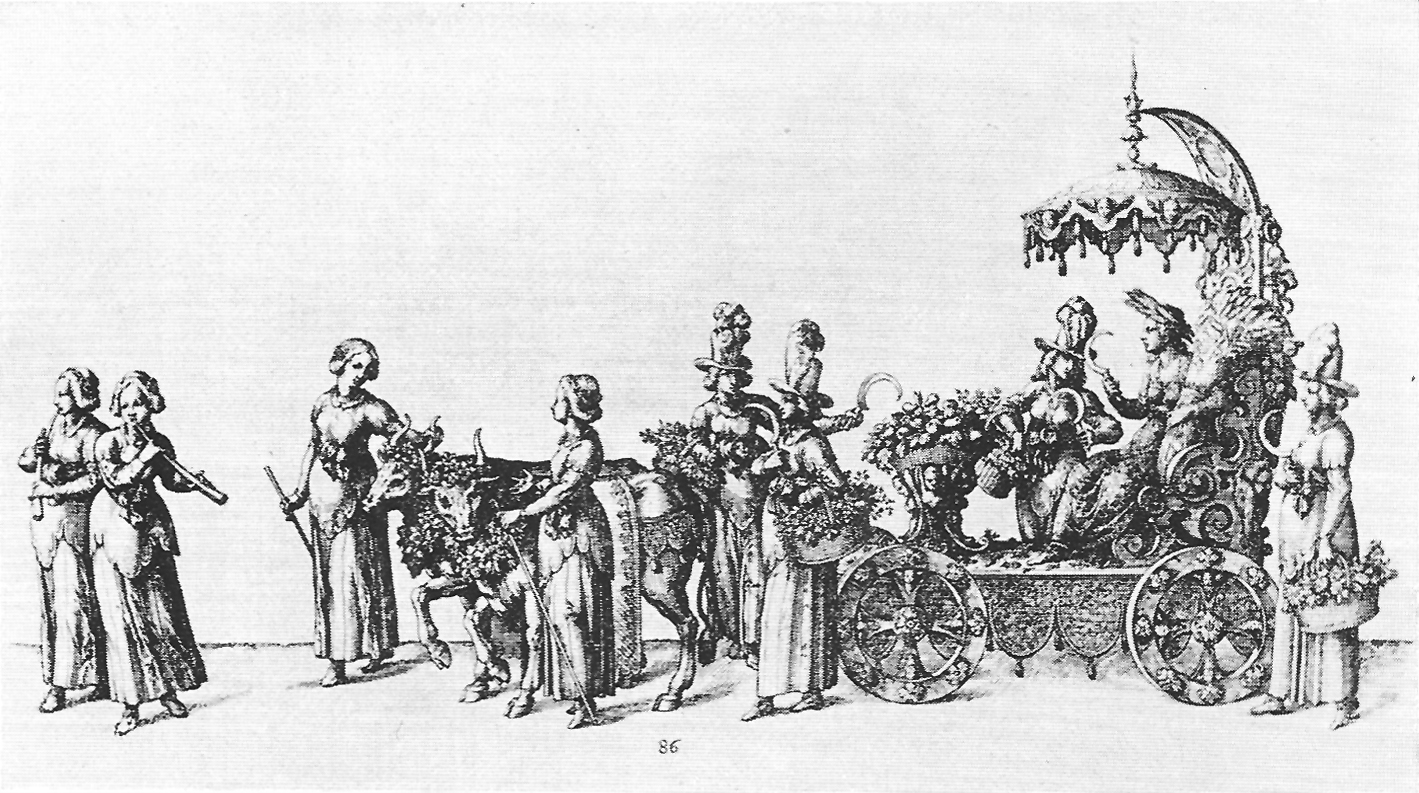 Stuttgarter Hoffeste, Bl. 86 (Radierung)